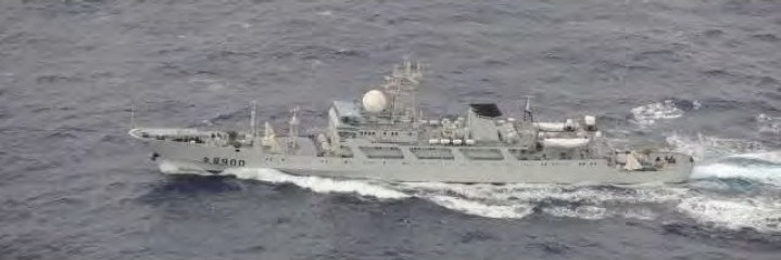 中文（台灣）: 北調900號船